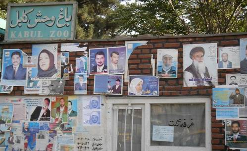 At Kabul Zoo